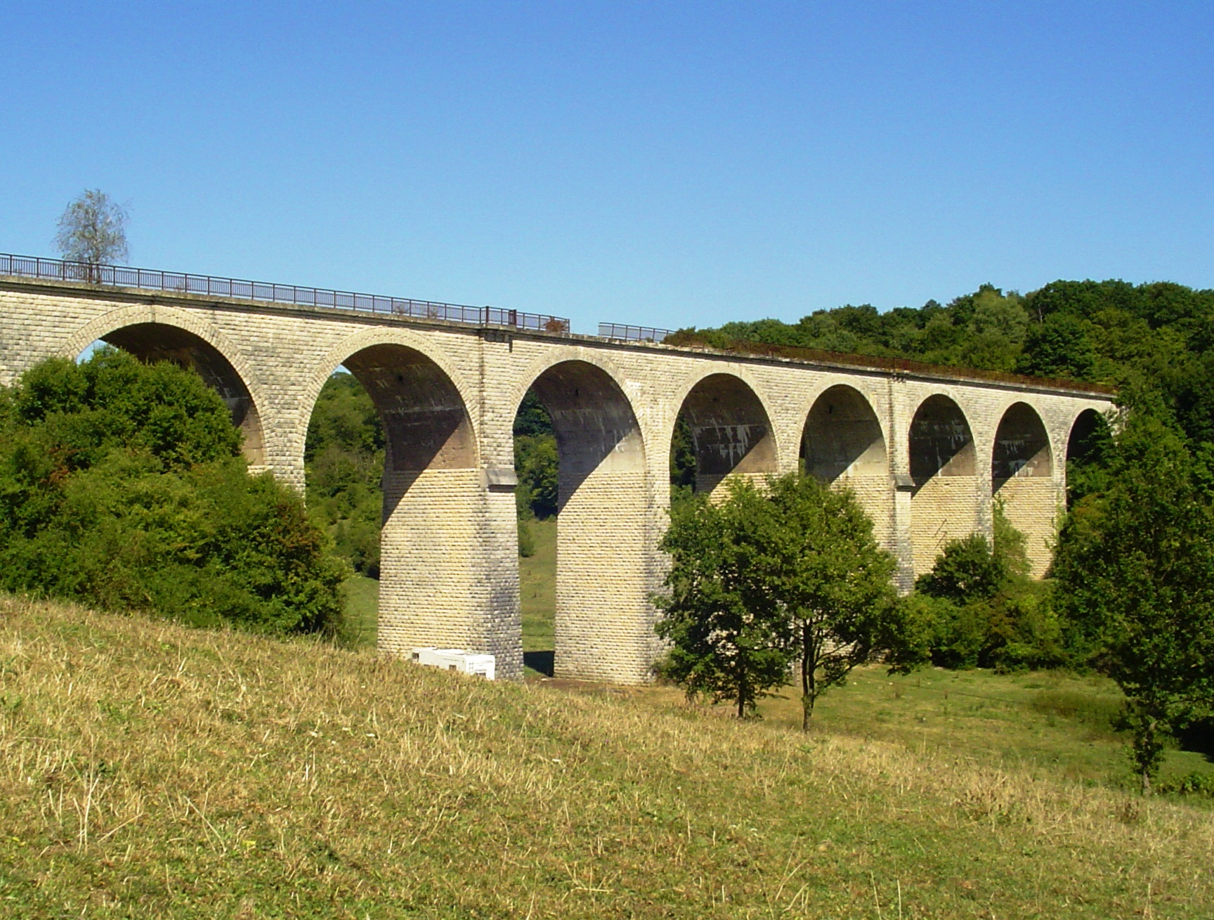 Le viaduc.